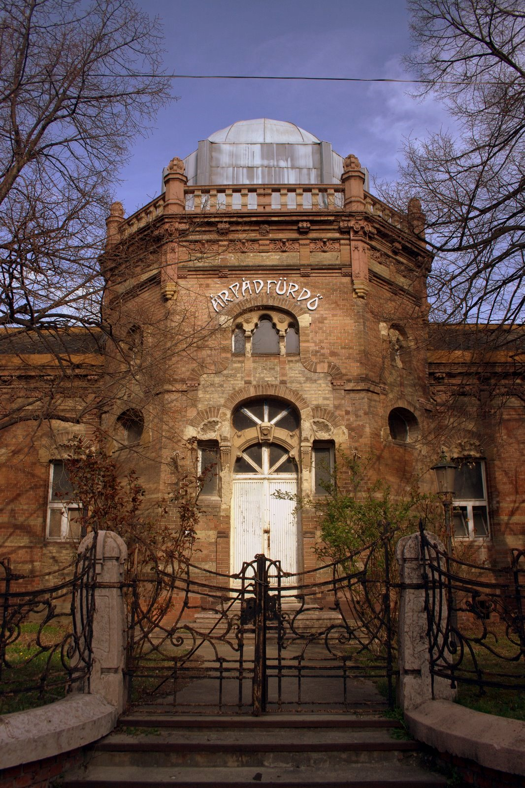 Árpádfürdő